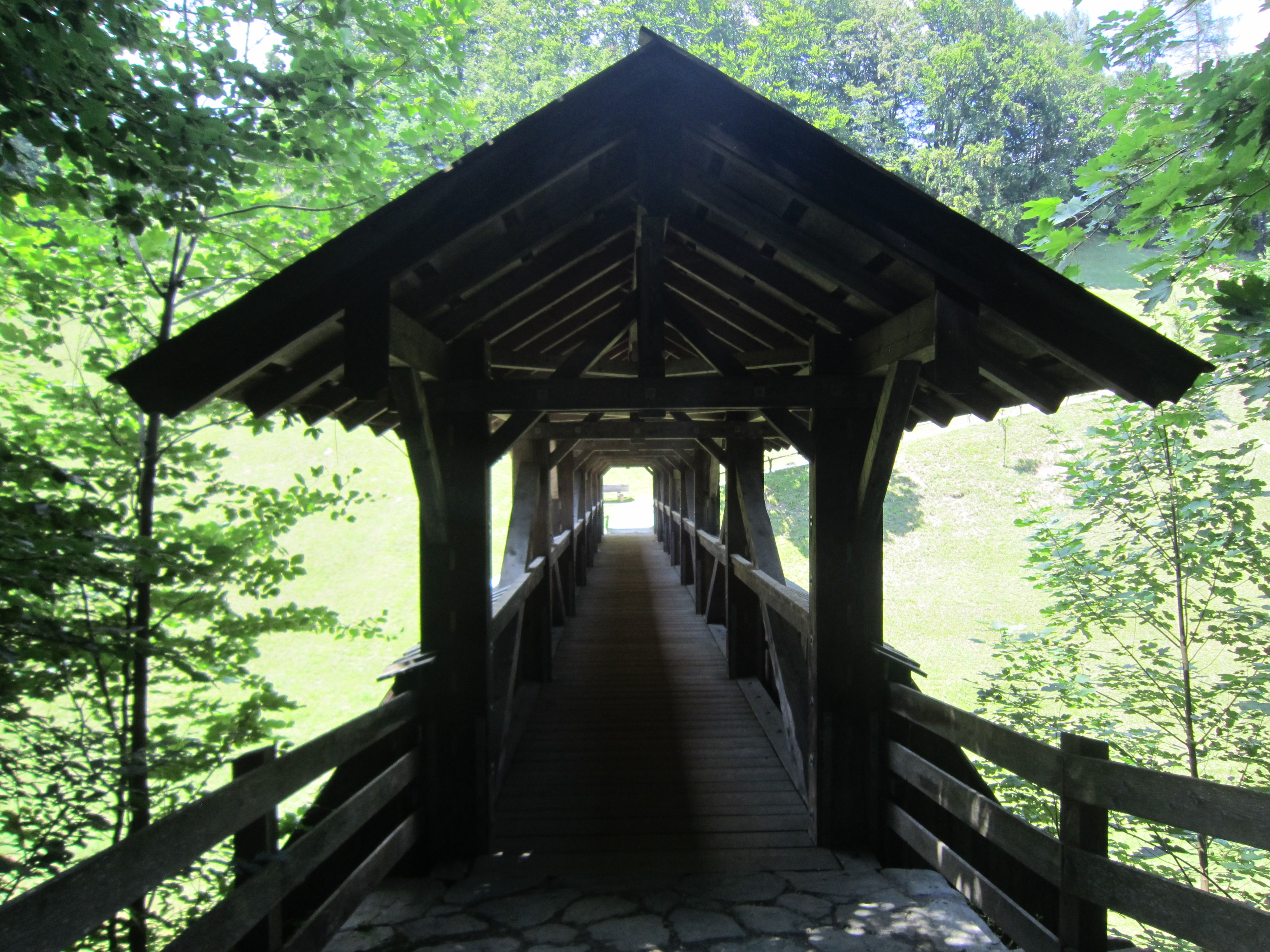 Gedeckte Holzbrücke im Museum Tiroler Bauernhöfe Kramsach